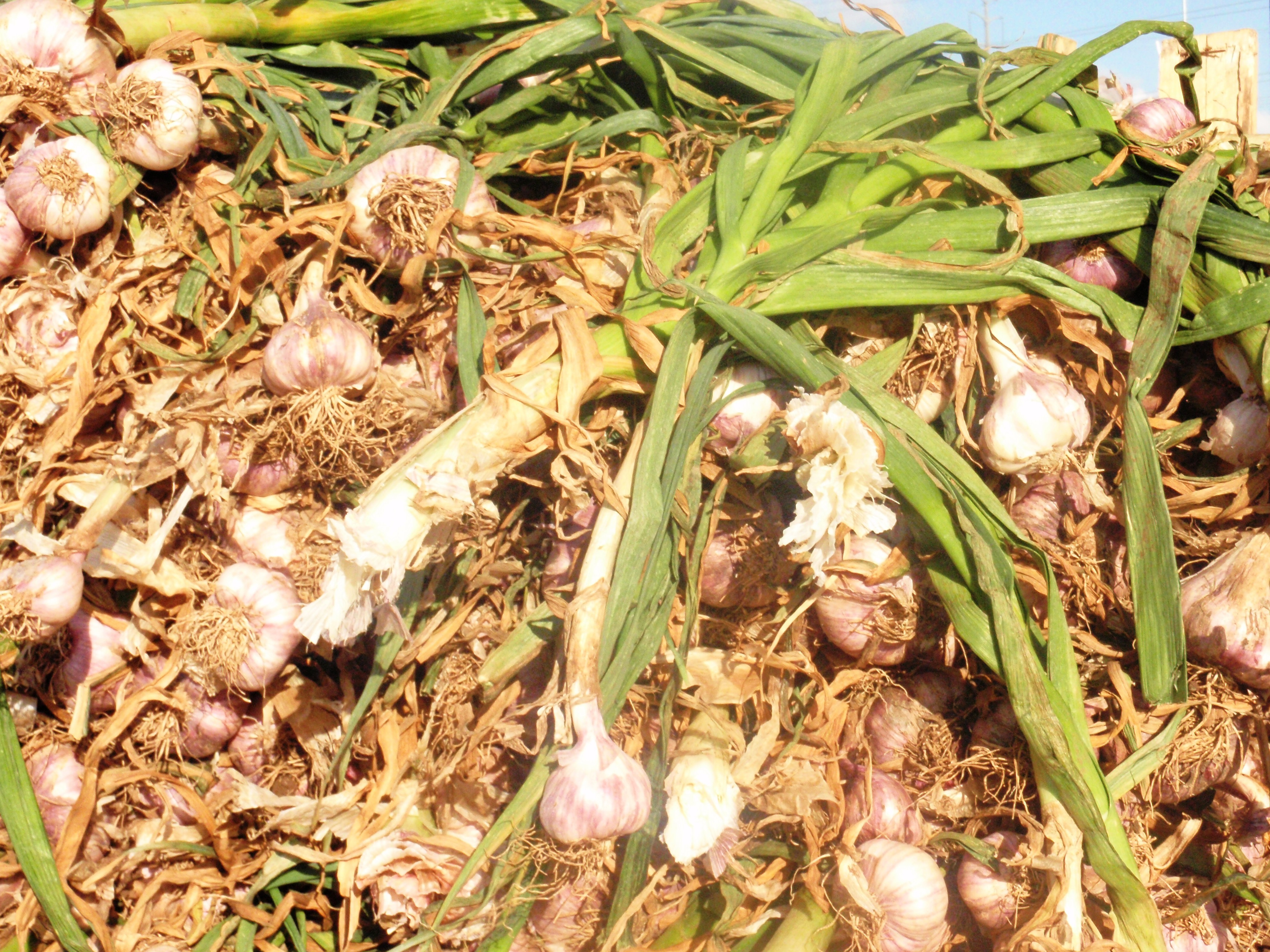 ירקות ופירות בשוק Vegetables and fruit market Fresh garlic